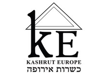 כשרות אירופה שעל ידי ועידת רבני אירופה